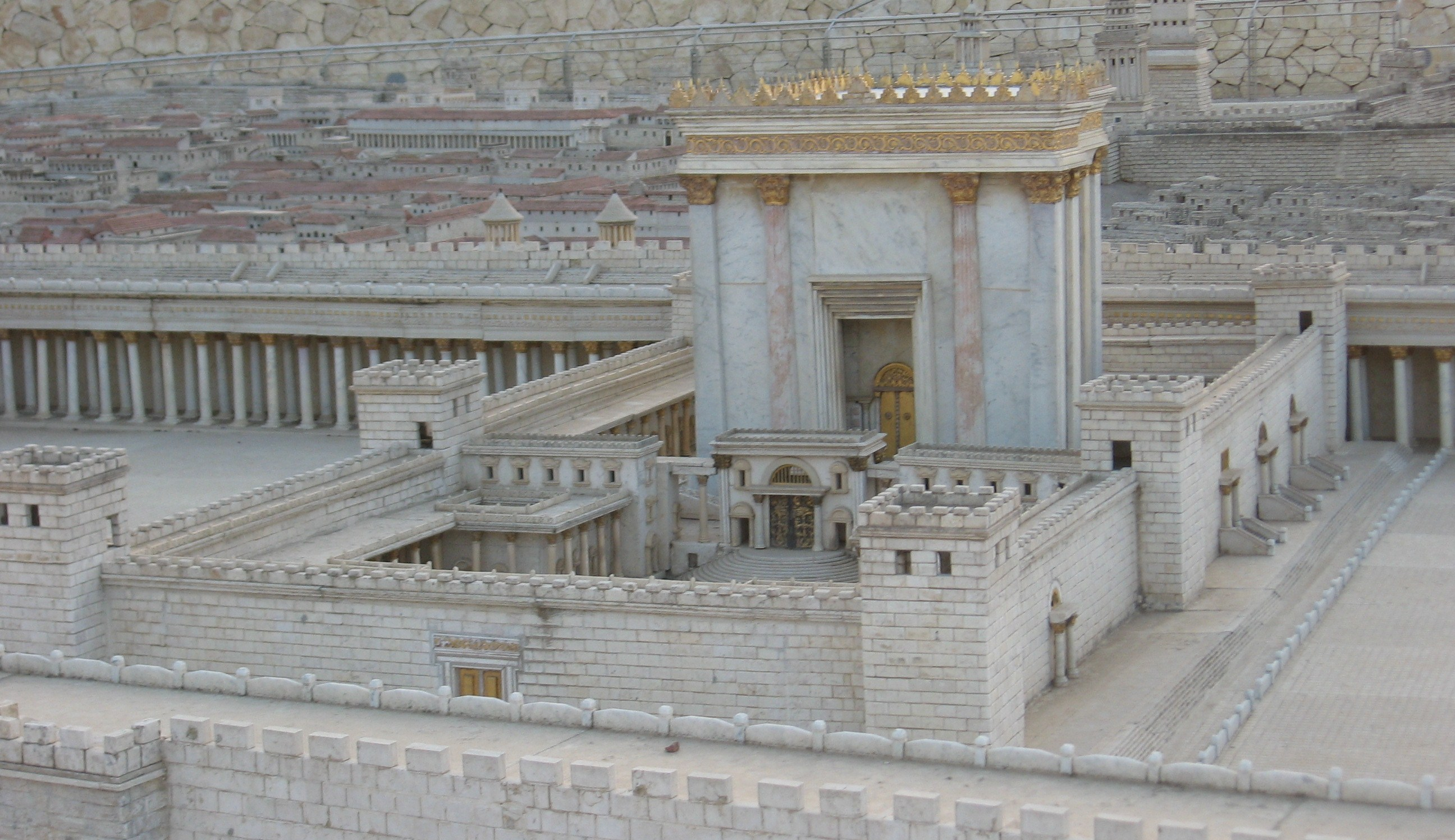 דגם ירושלים בסוף ימי בית שני